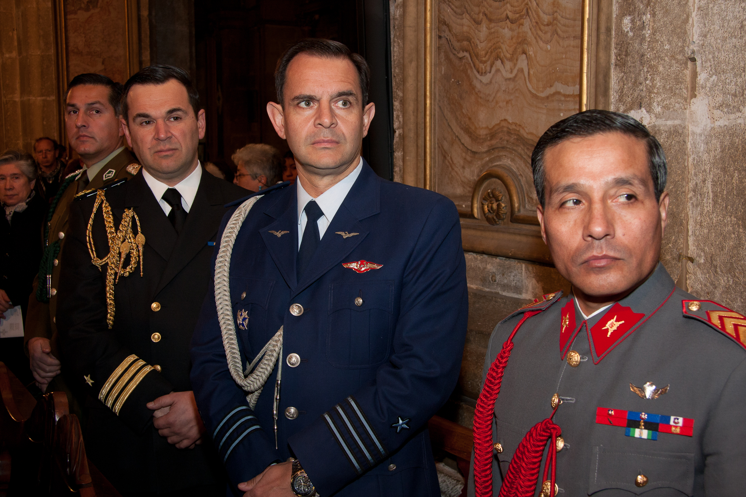 Edecanes de Chile: de izquierda a derecha Carabineros, Armada, Fuerza Aérea, Ejército.